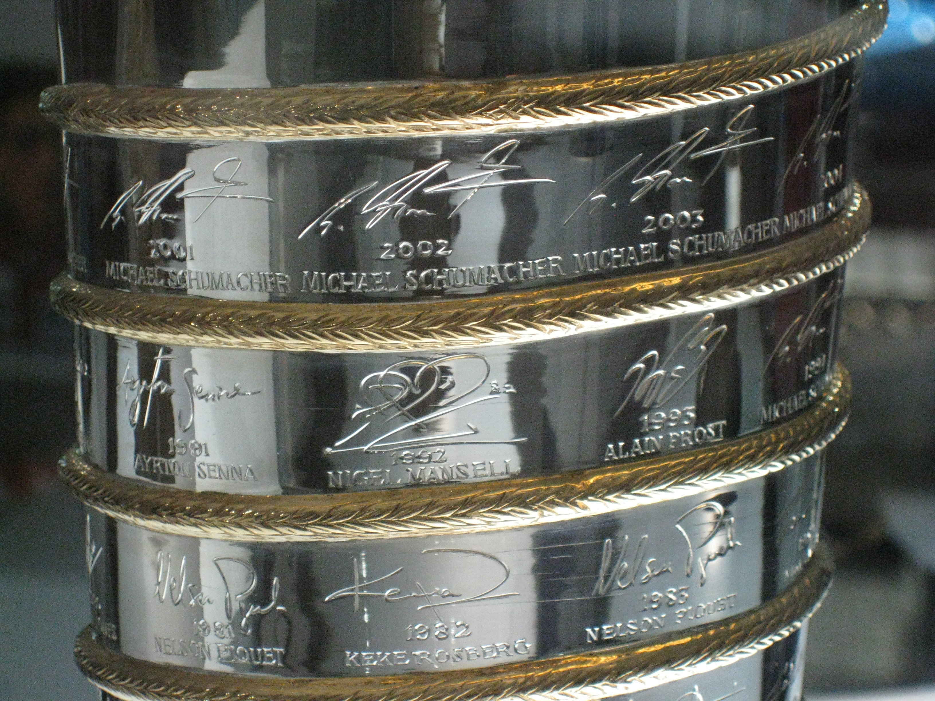 Copa de la FIA de campeón del mundo, detalles de las firmas de los diferentes campeones del mundo en la copa